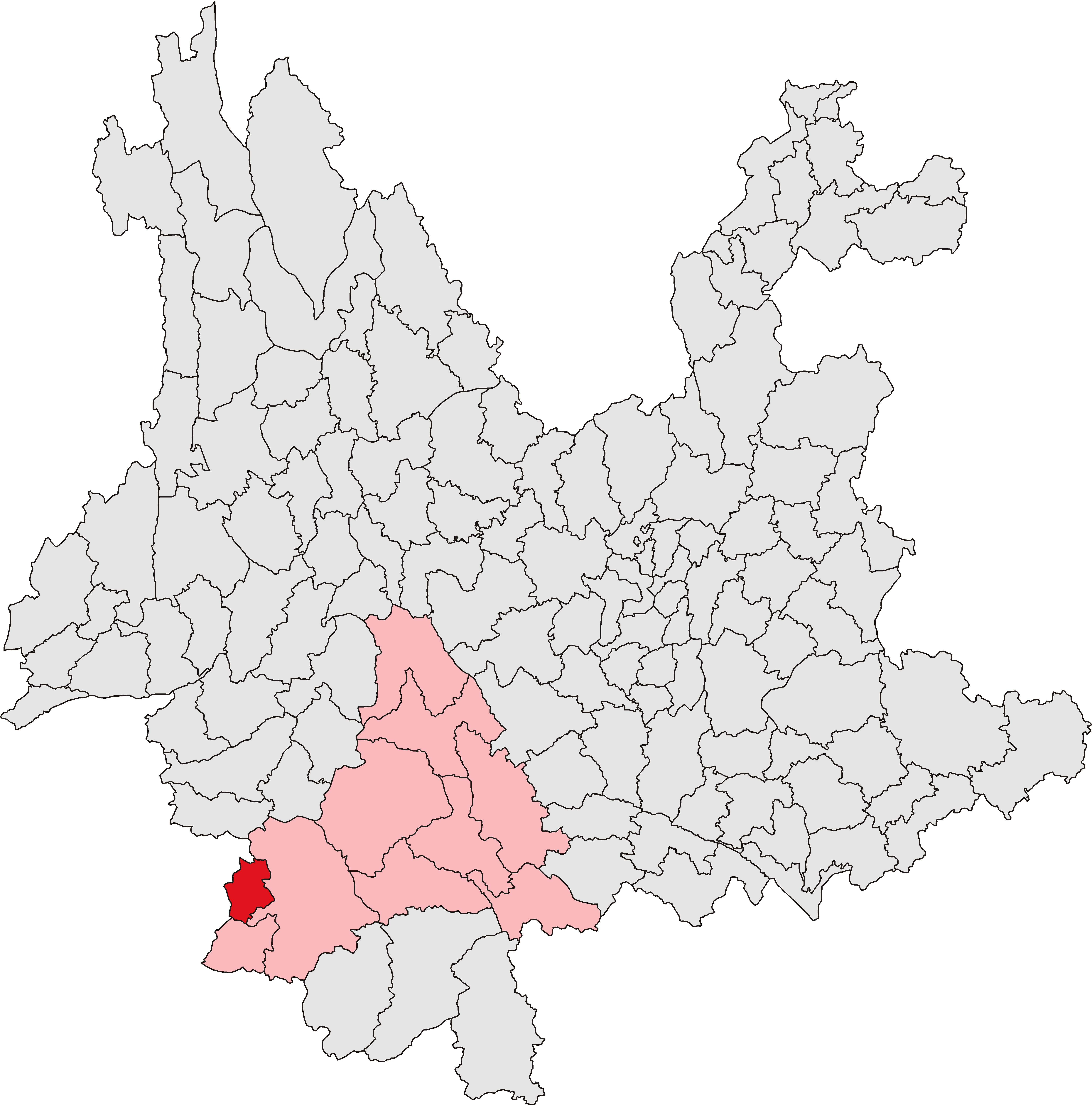 西盟佤族自治县位置图